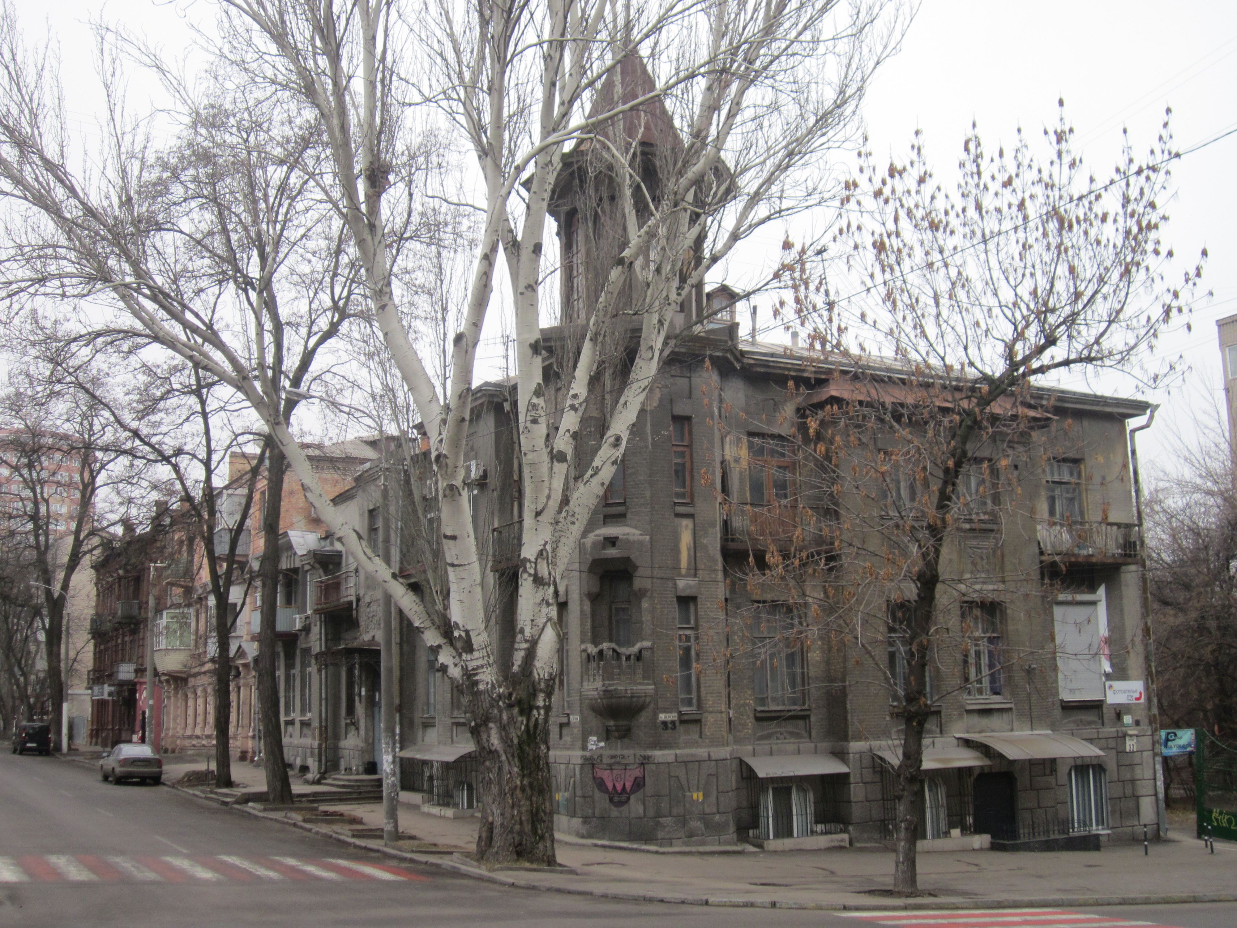 Особняк, Дніпро, Шевченка вул., 33